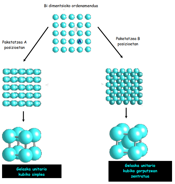 Bi dimentsioko ordenamendua